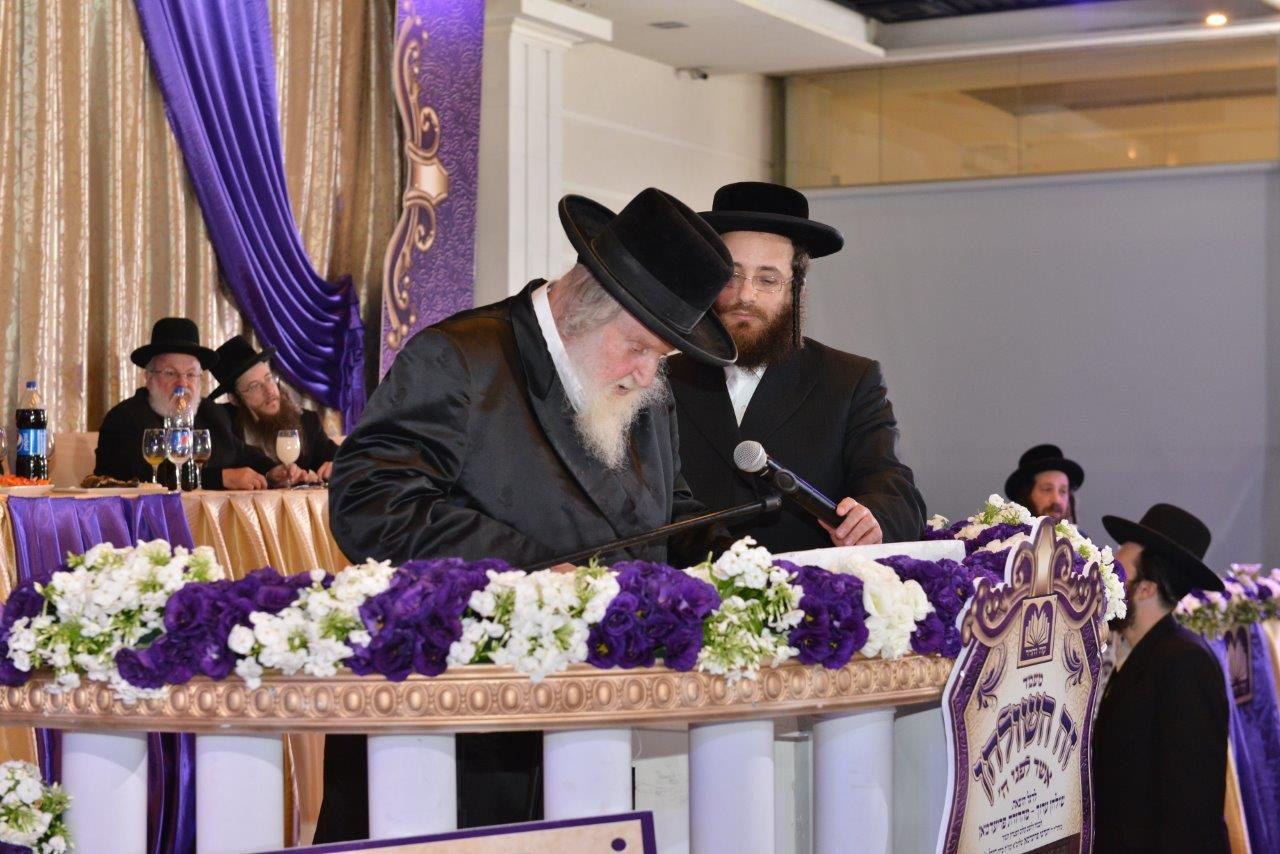 הרב משה שטרנבוך